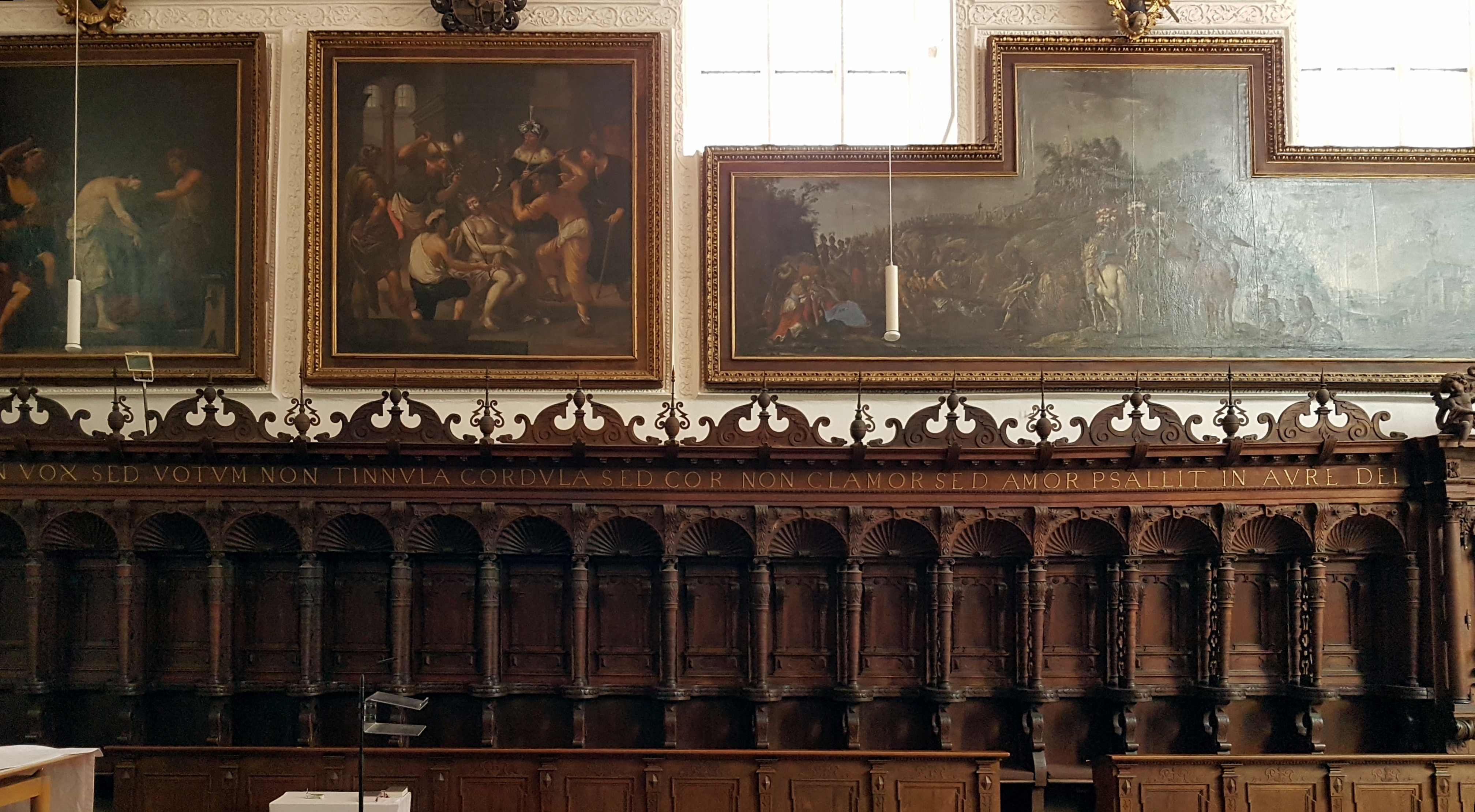 St. Vitus (Regensburg), Teil des reich verzierten Chorgestühls mit einem Teil des darüber befindlichen Jesuszyklus.